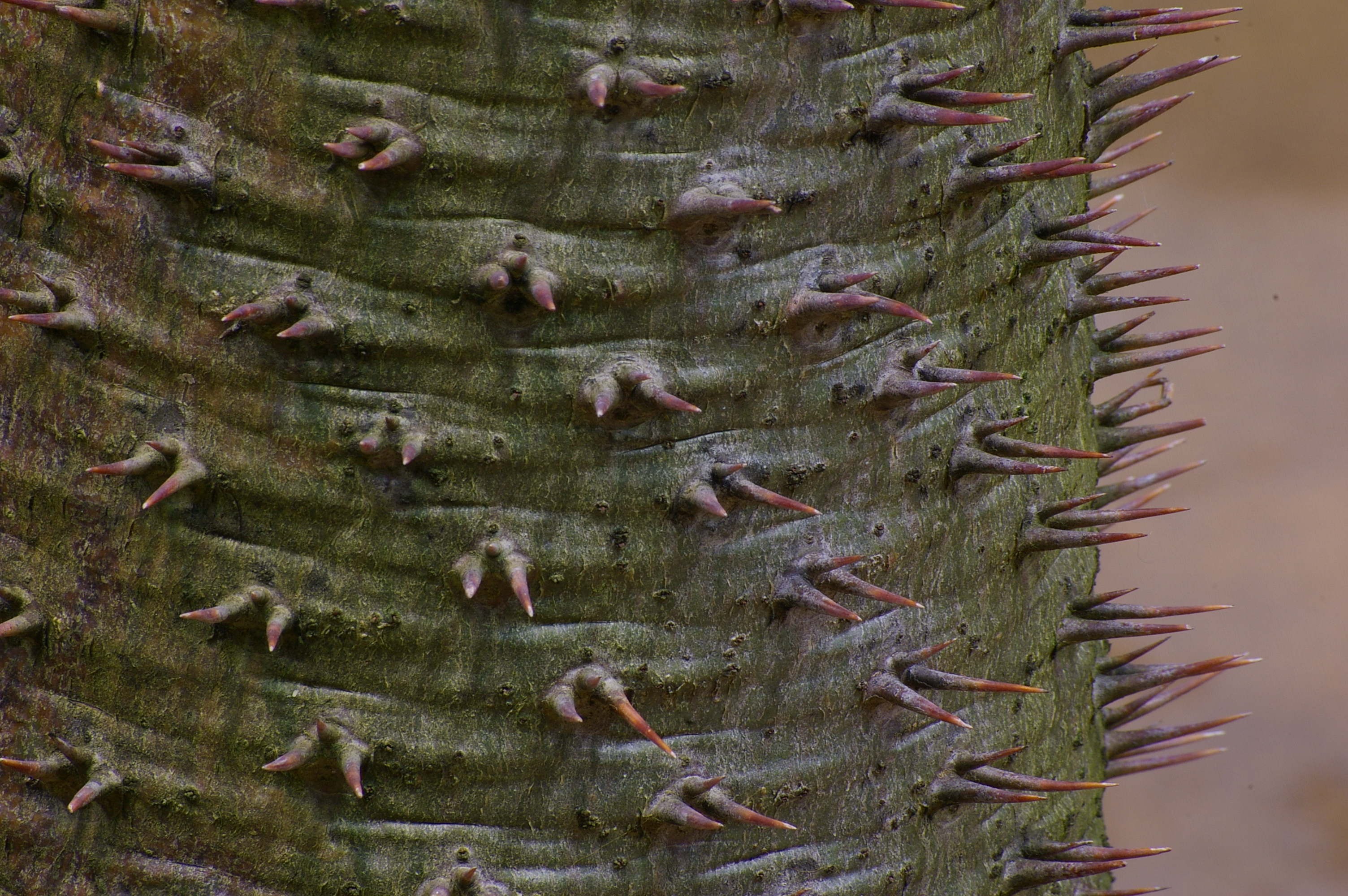 Snímek byl pořízen během "Fotografickéh workshopu v Botanické zahradě Fata Morgana", Praha, 15. prosince 2012.